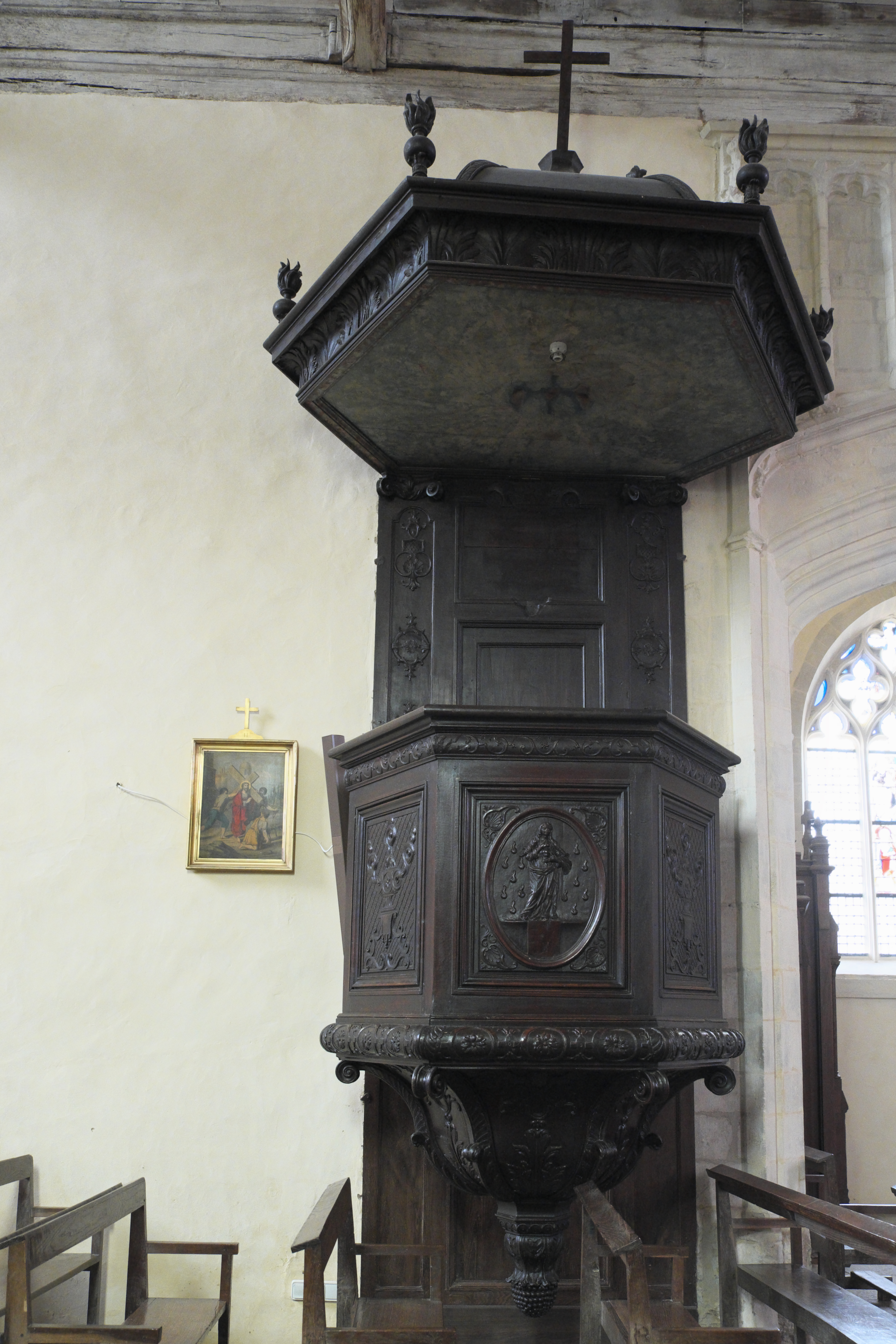 Kirche Sainte-Marie-Madeleine, ehemalige Stiftskirche Notre-Dame, in Champeaux im Département Ille-et-Vilaine (Region Bretagne/Frankreich), Kanzel aus dem 18. Jahrhundert